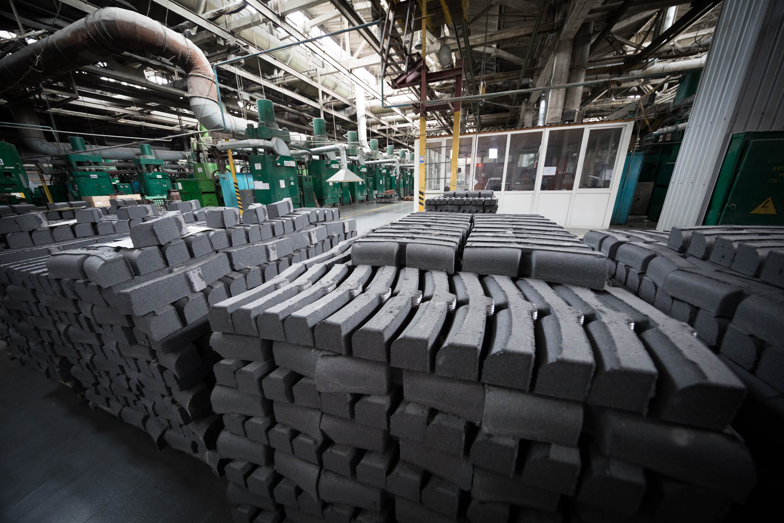 Виробничий цех і продукція на заводі Трібо